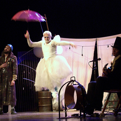 Ruggero Dondi interpreta Giulietta nella produzione teatrale Leart "Romeo e Giulietta - Nati sotto contraria stella"